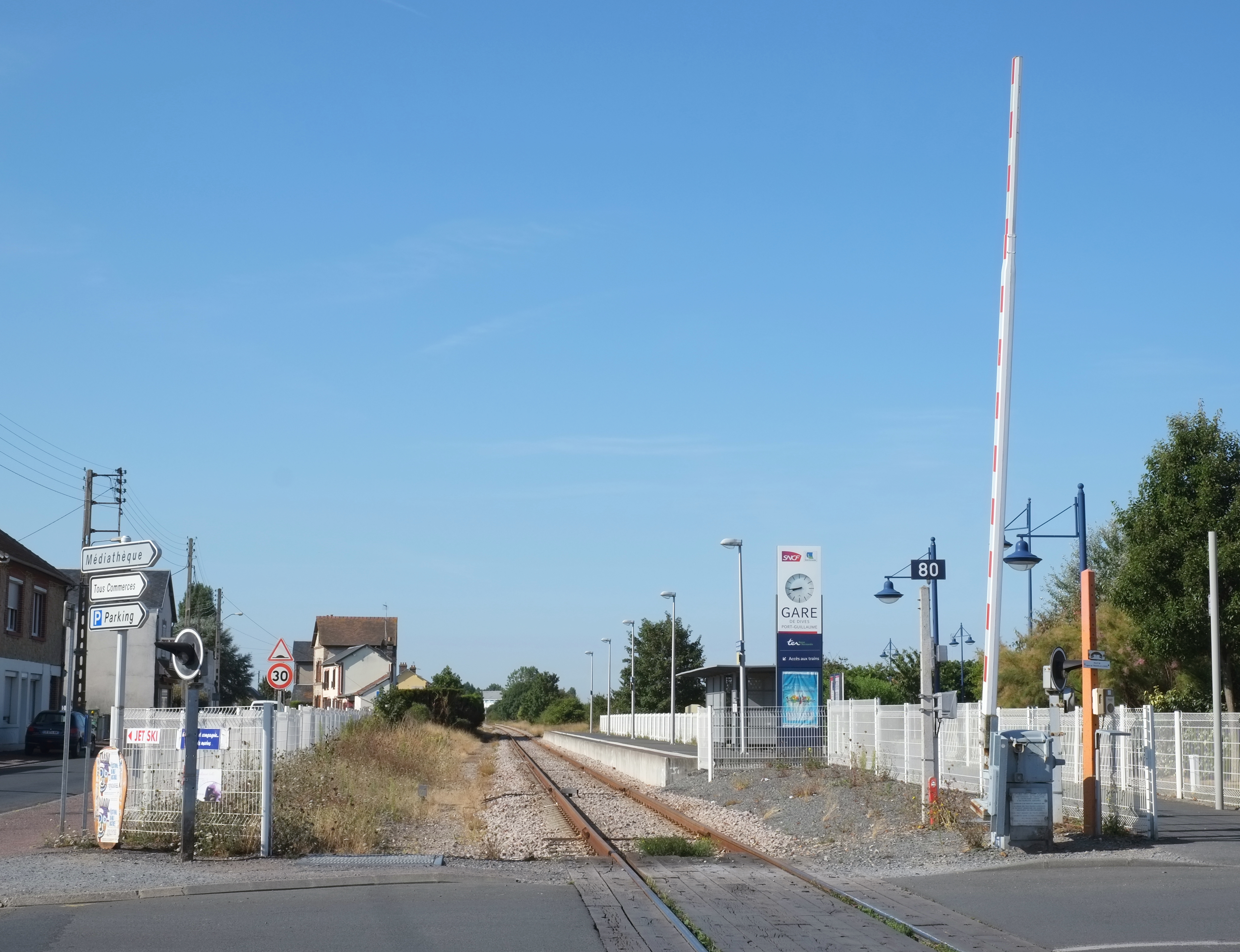 Haltestelle Gare de Dives-sur-Mer-Port-Guillaume in Dives-sur-Mer